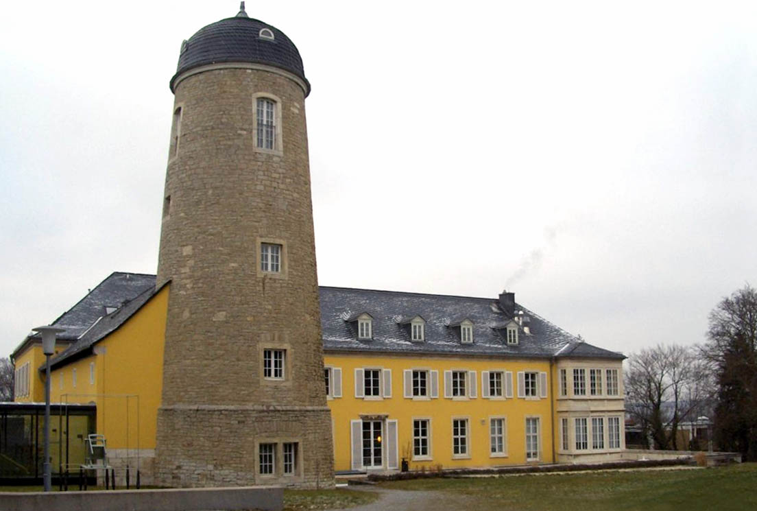 Gauleitervilla in Weimar.